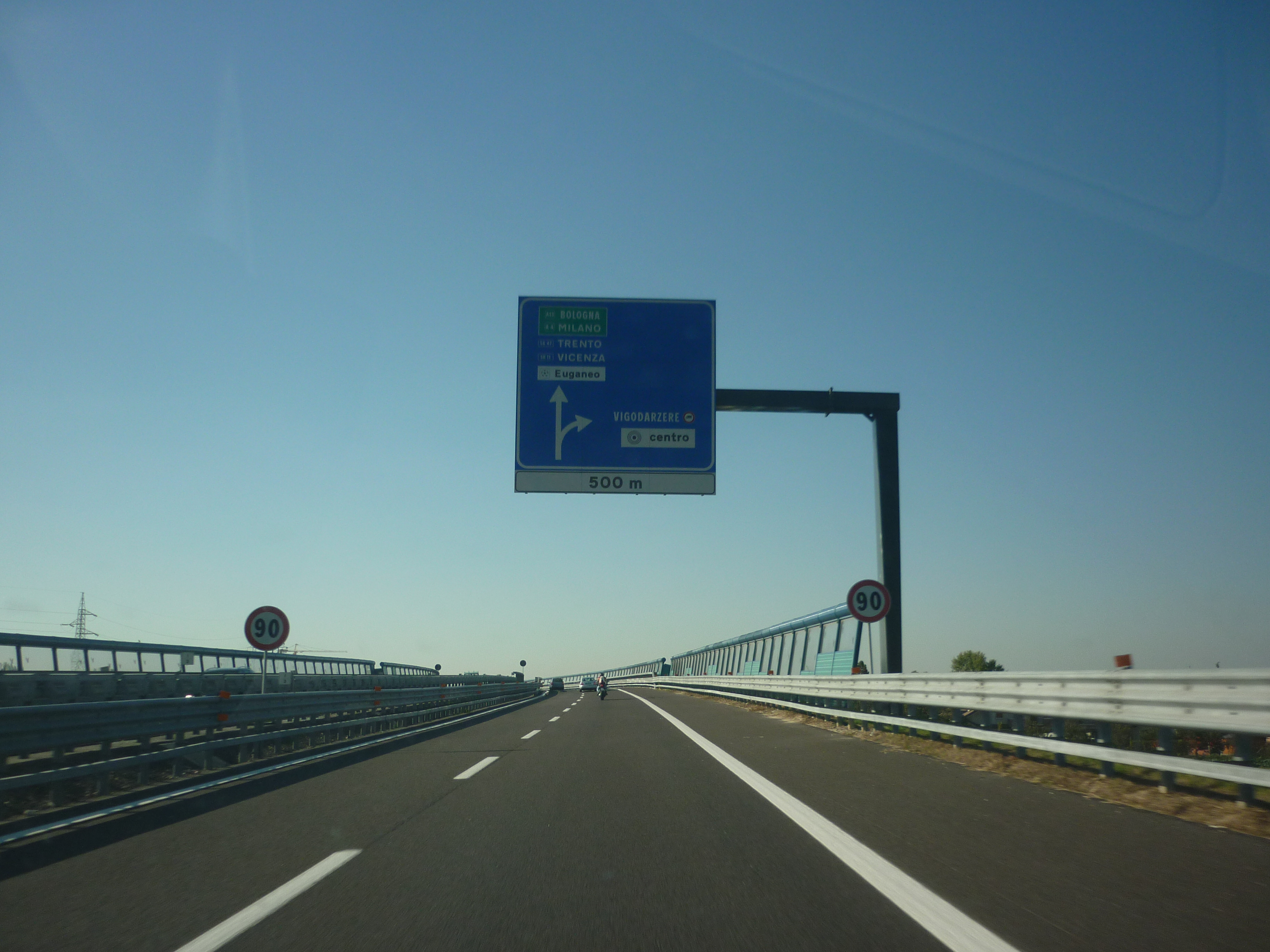 tang nord padova